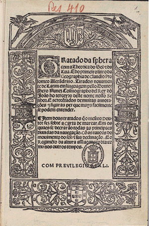 Portada del libro Tratado da sphera, del portugués Pedro Nunes (escrito Pero Nunez en esta obra). Publicado en Lisboa en 1537.